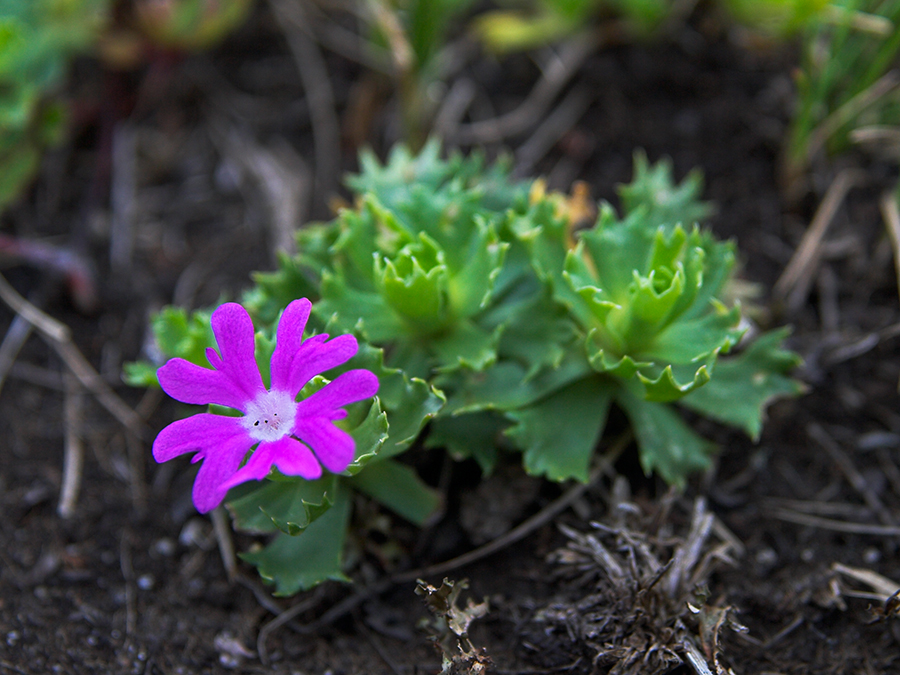 Primula minima -Zwergprimel